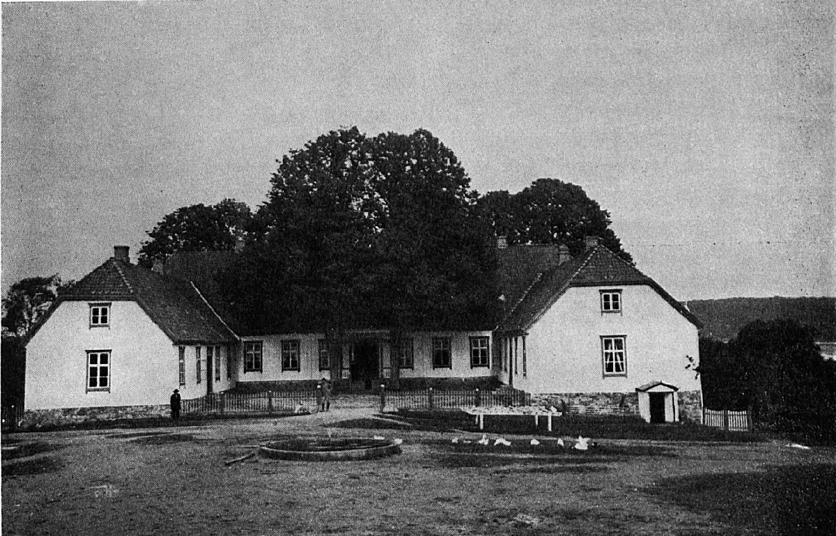 Tose (Thorsø herregård)